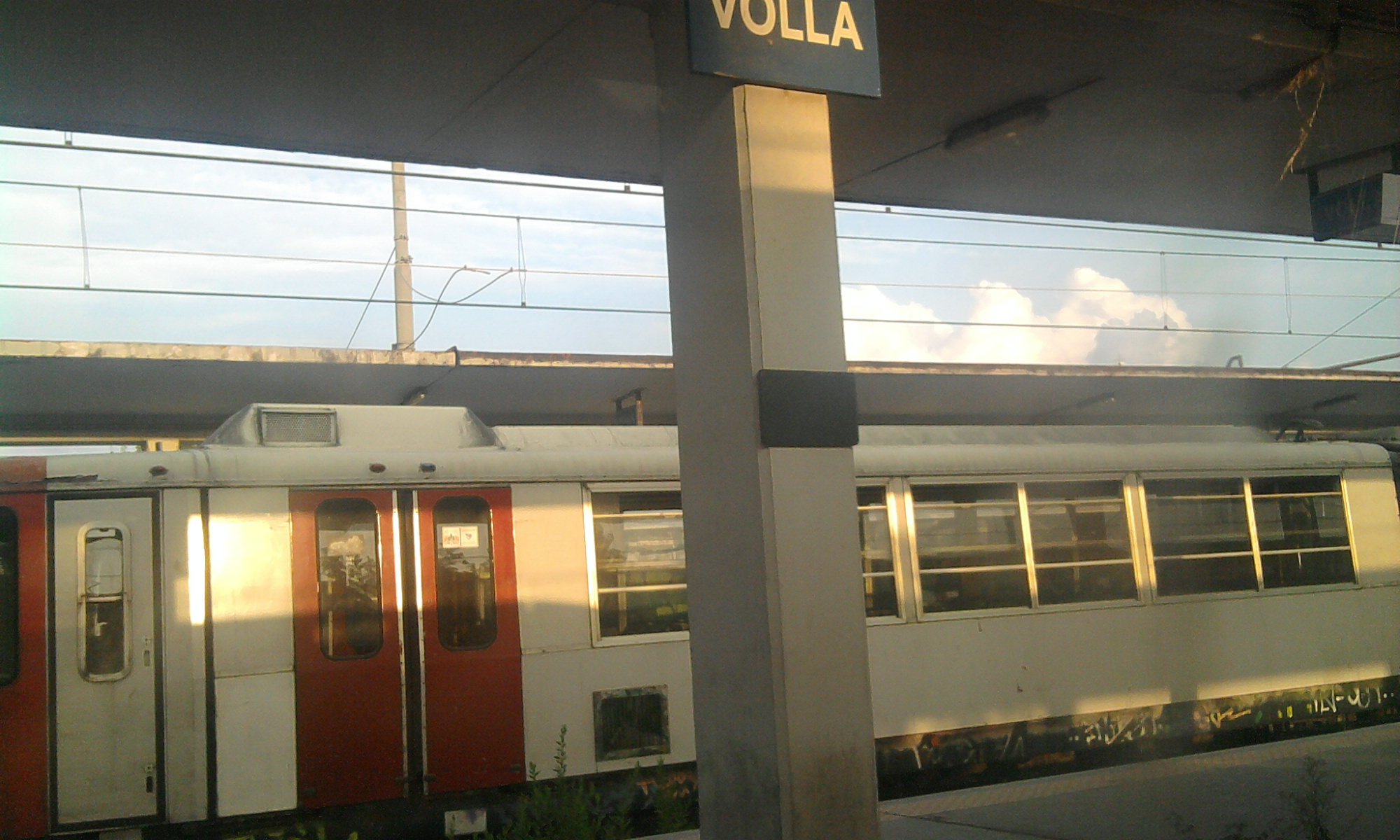 La stazione di Volla